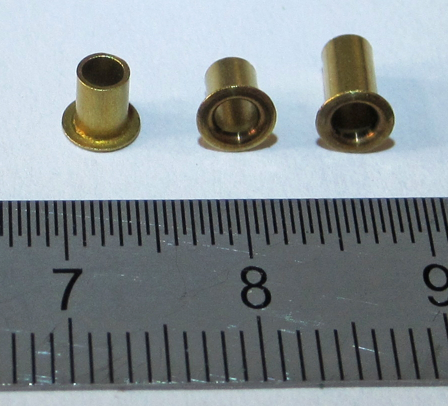 Hohlniete 3x6mm & 3x5mm, Material Messing